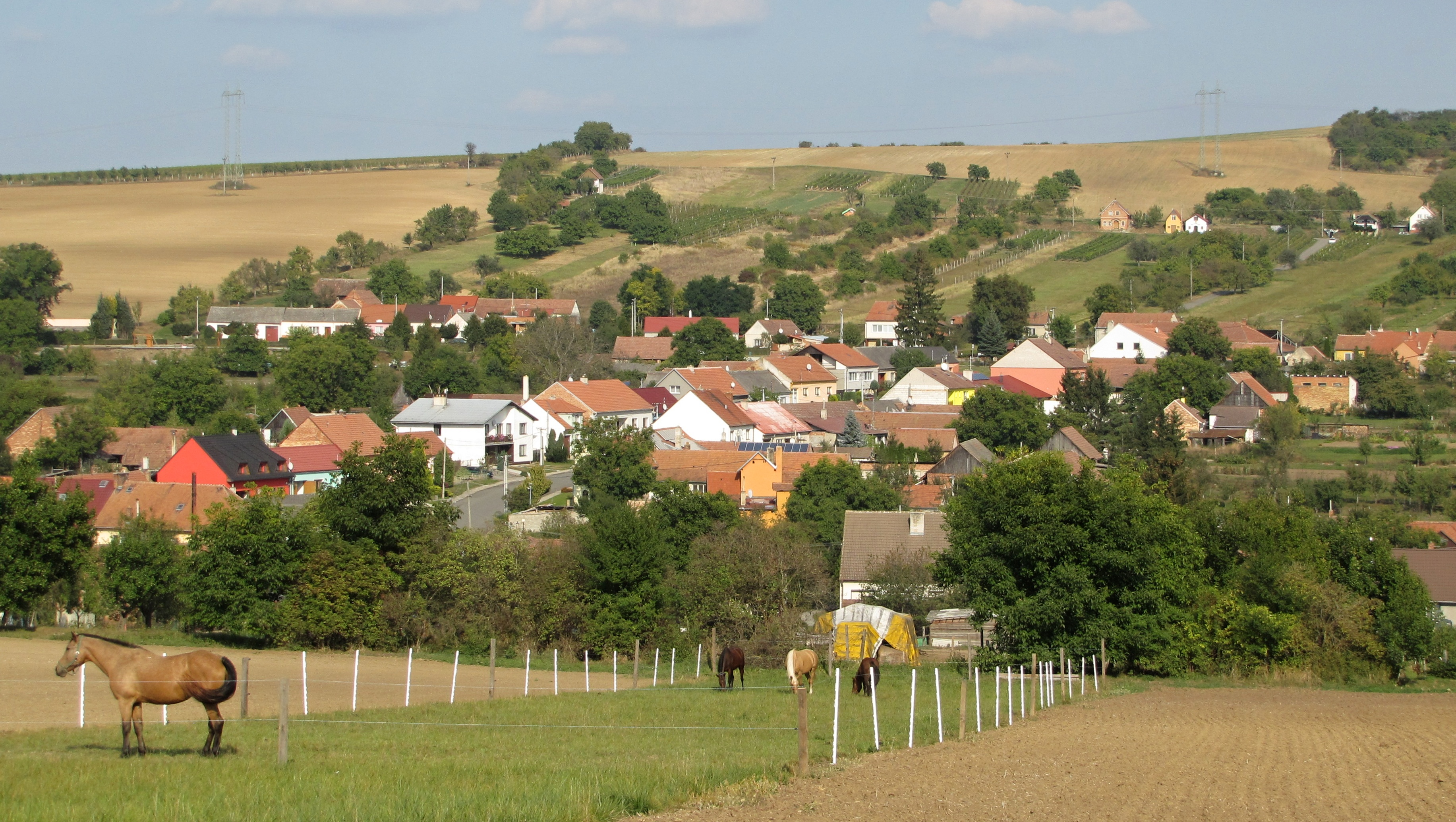 Pohled na obec Hýsly od západu